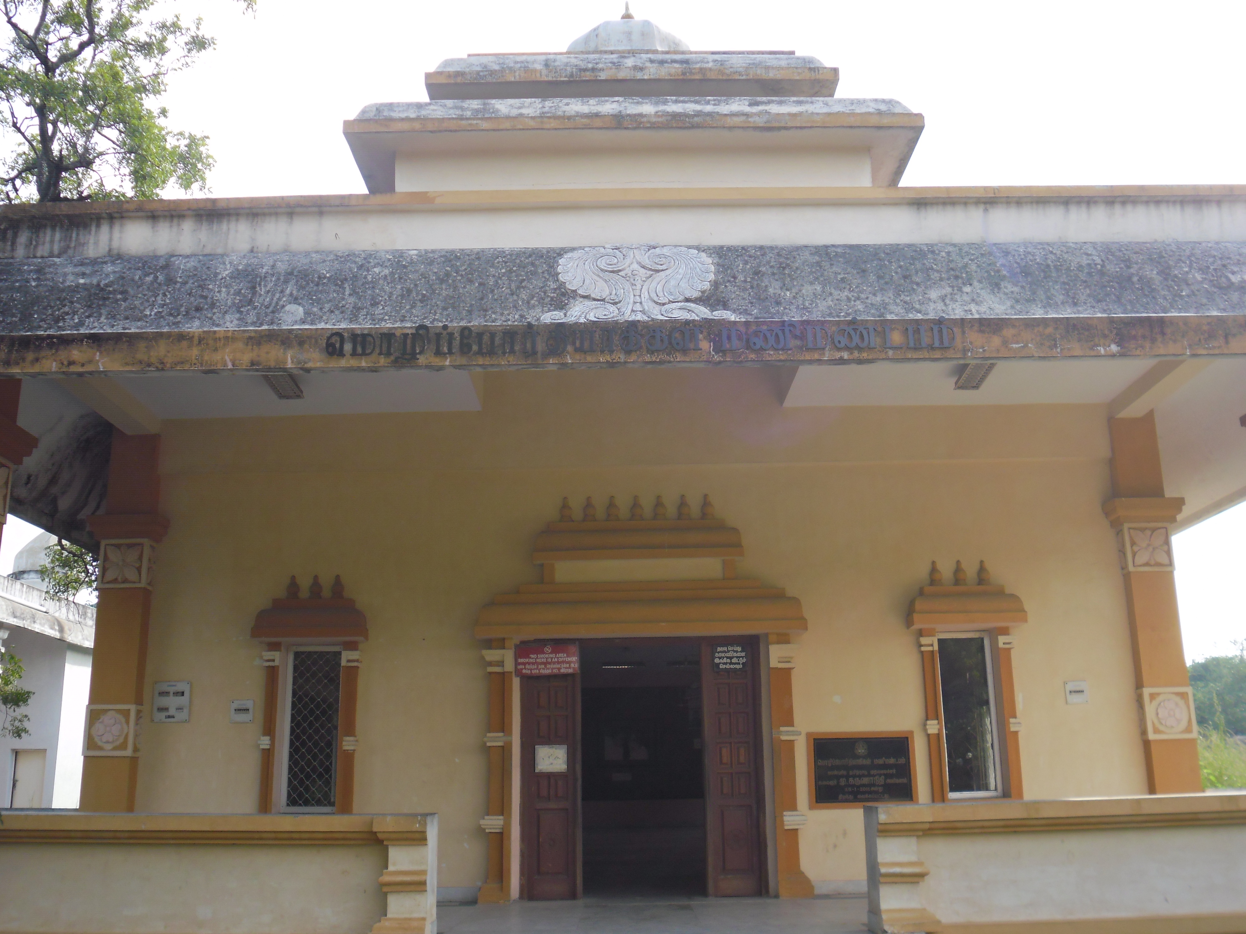 மொழிப் போர்தியாகிகள் மண்டபம்